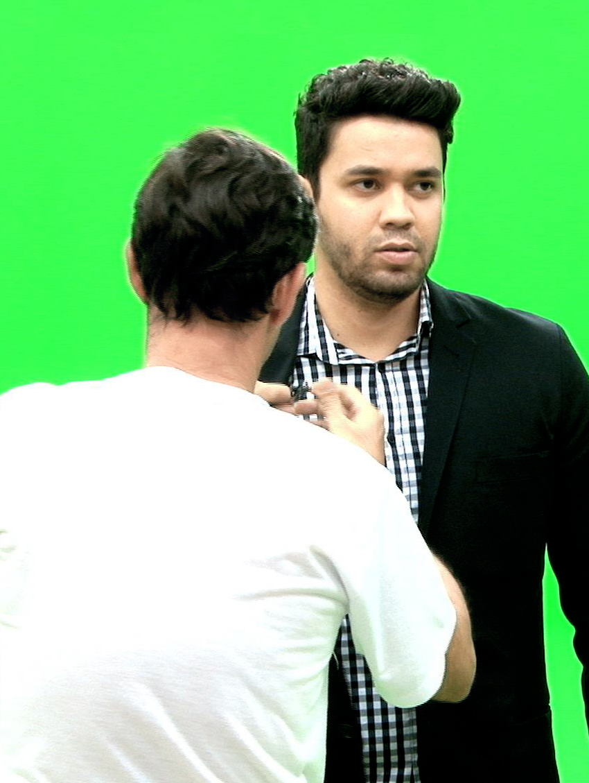 Rufis Jr em 2016 durante as gravações de seu programa nos estúdios da TV Cultura Paulista.